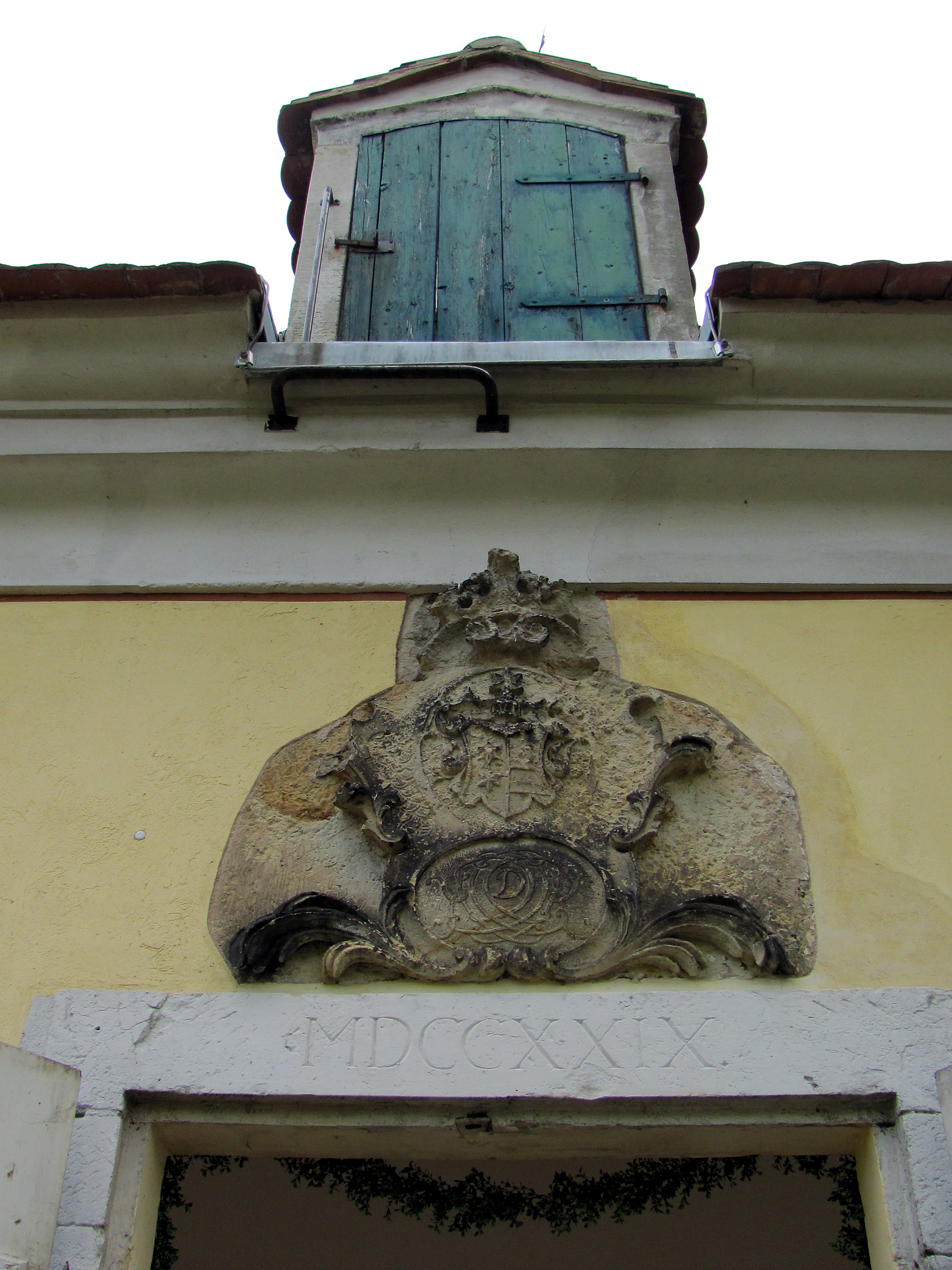 Radebeul, Minckwitzsches Weinberghaus, Wappen und Datierung